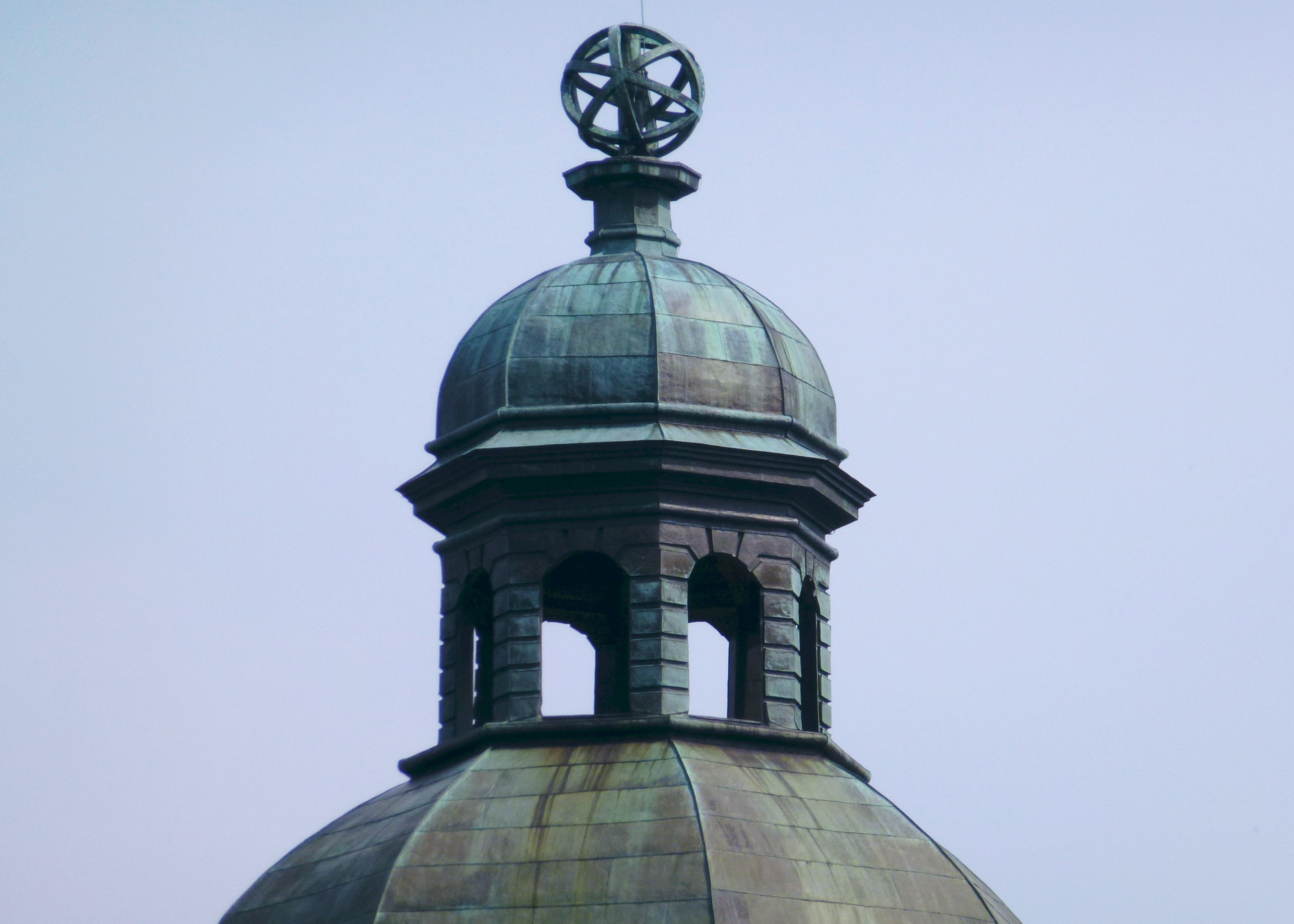 Skokloster slotts torn, lanternin och glob